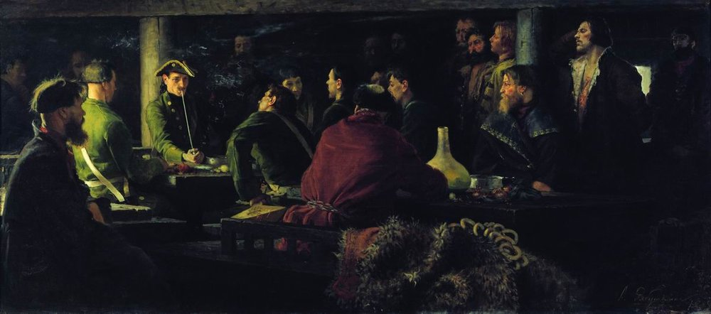 Потешные Петра I в кружале. 1892. Холст, масло. 105x237 см. Государственная Третьяковская галерея, Москва